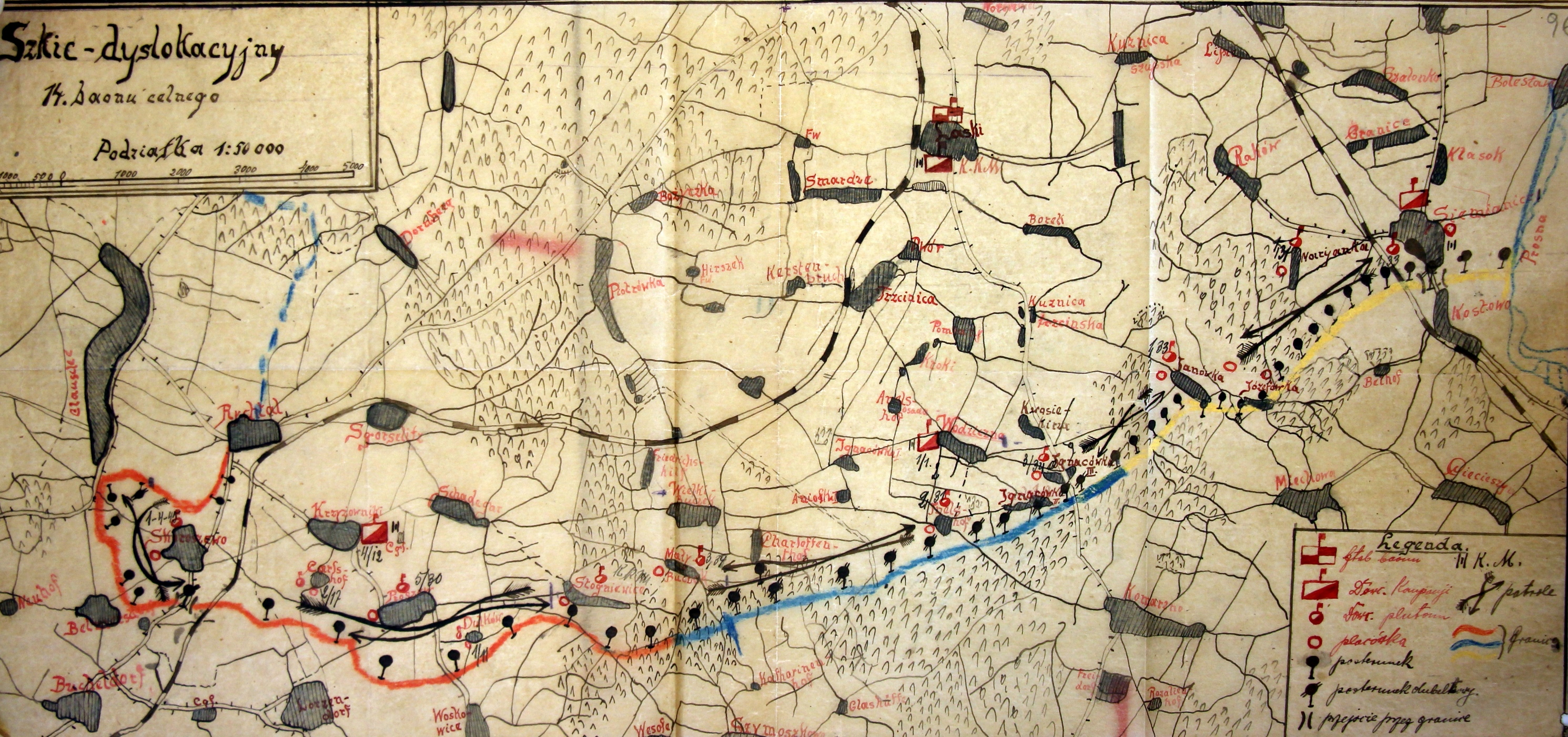 Szkic 14 batalionu celnego - lata 20. XX wieku